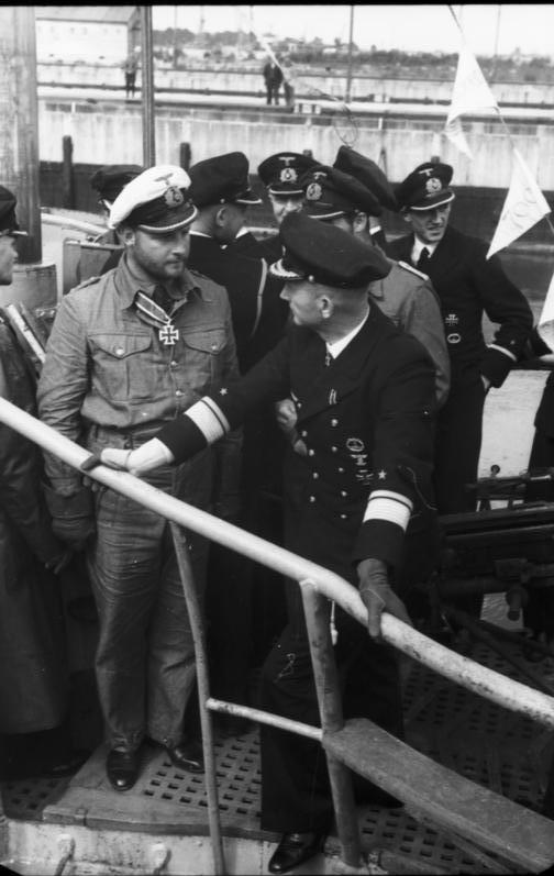 Unterseeboot von erfolgreicher Feindfahrt zurück. Ein deutsches Unterseeboot versenkte unter Führung von Kapitänleutnant Lemp auf einer Feindfahrt 47 000 BRT. Kapitänleutnant Lemp berichtet dem Befehlshaber der Unterseeboote, Vizeadmiral Dönitz über seine erfolgreiche Feindfahrt.